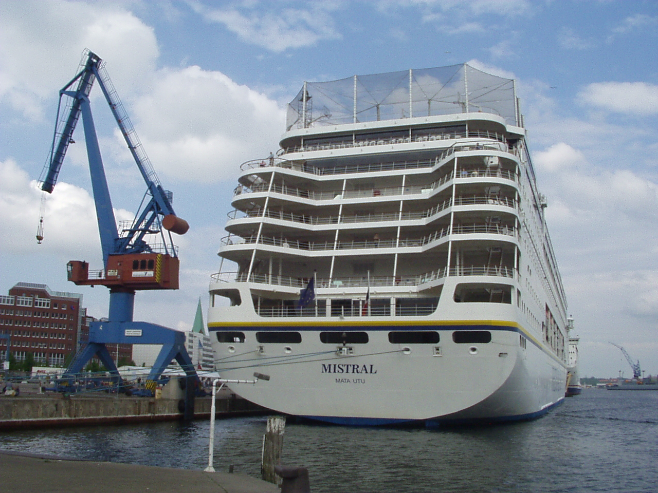 Heckansicht der Mistral, 2003 in Kiel